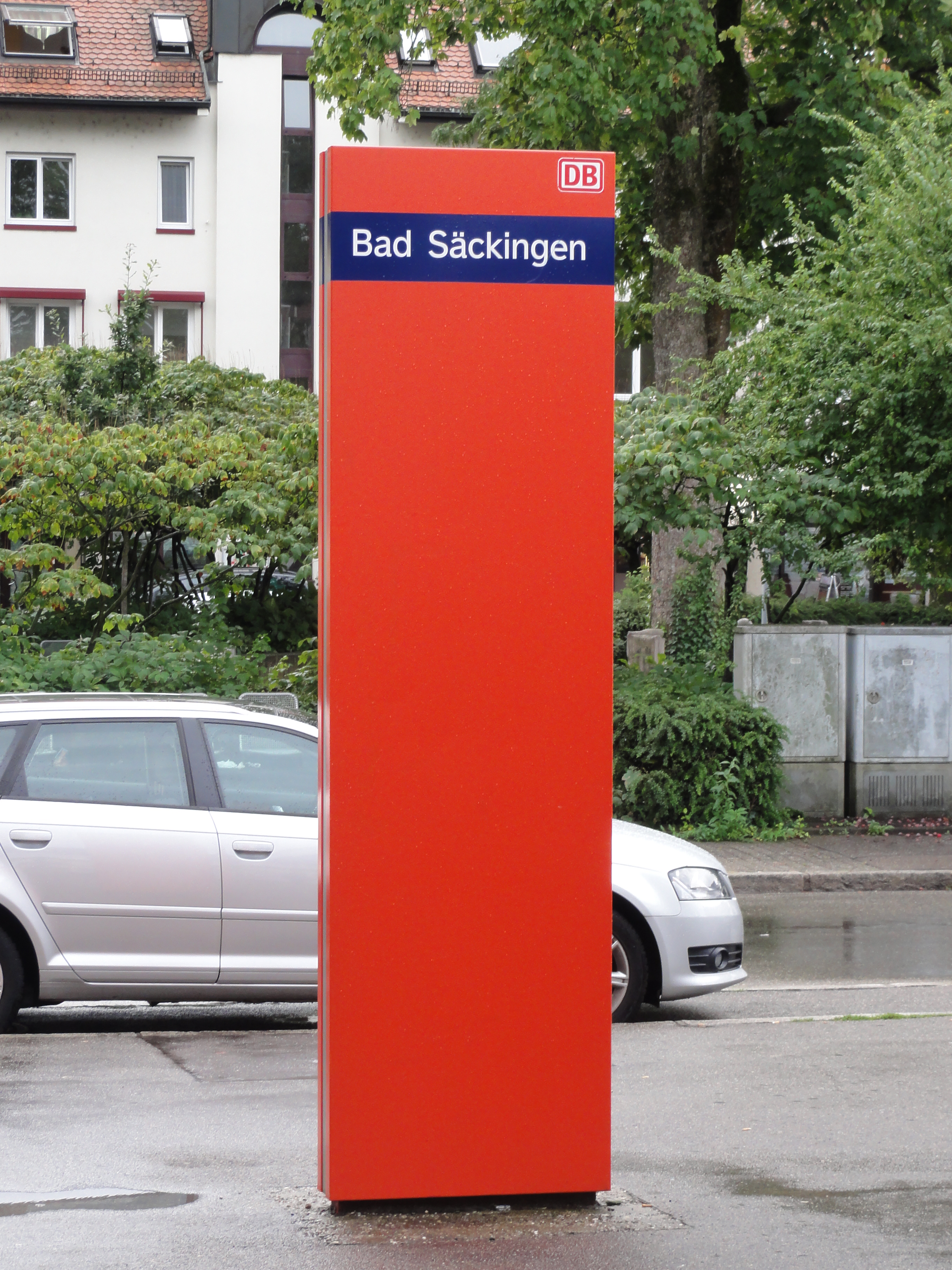 Bad Säckingen — Infostele am Bahnhof Info GPS data may be inaccurate. EXIF data regarding date and time may be inaccurate. A geocoded location could be added to this image. Visit Commons:Geocoding for information on how to add coordinates. Beta-test: Add coordinates helps to determine coordinates.